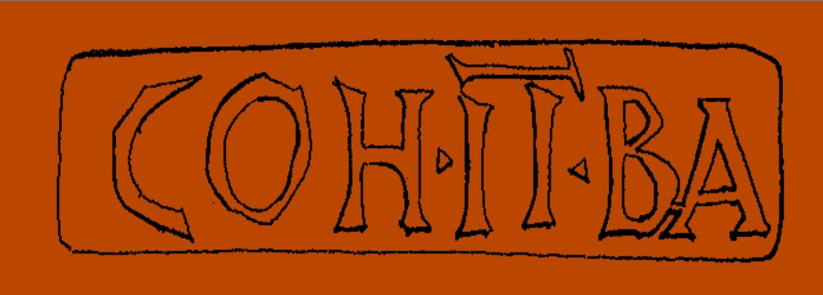 Rekonstruierter röm. Ziegelstempel d. Cohors II Batavorum nach H.Ubl. Quelle: Hannsjörg Ubl: I. Das Römische Klosterneuburg, in Klosterneuburg, Geschichte und Kultur, Band 1, 1991, S. 72